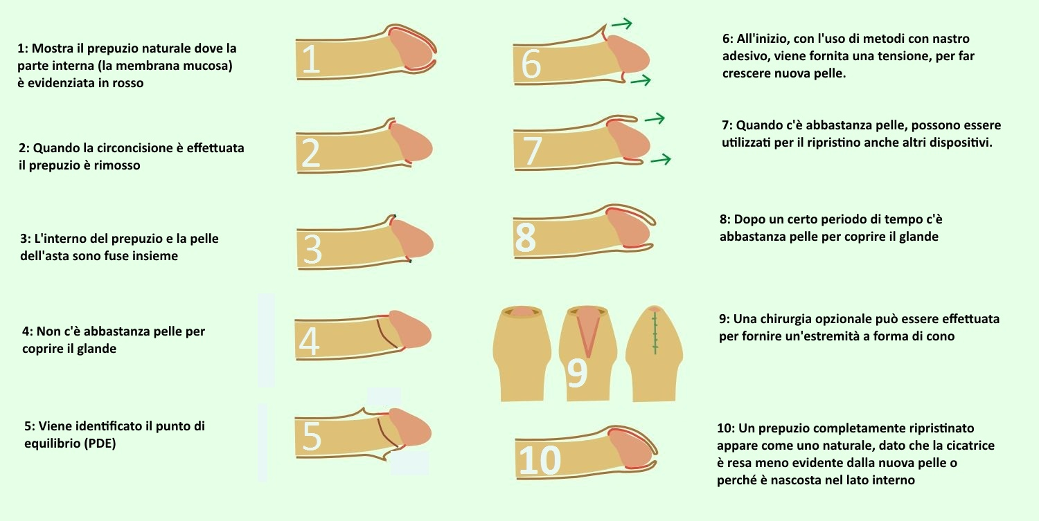 Procedura di ripristino del prepuzio